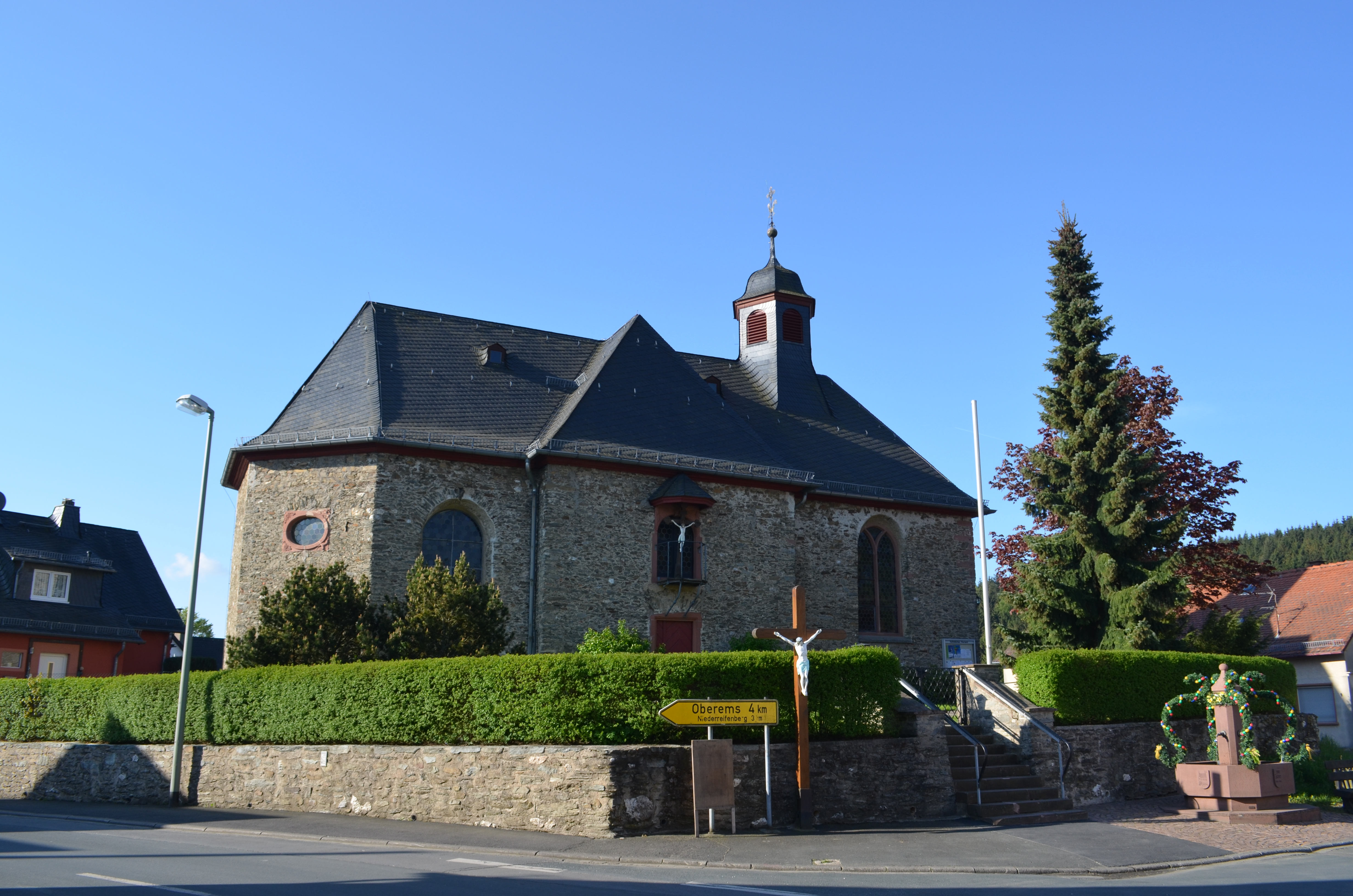 Seelenberg, Kirche